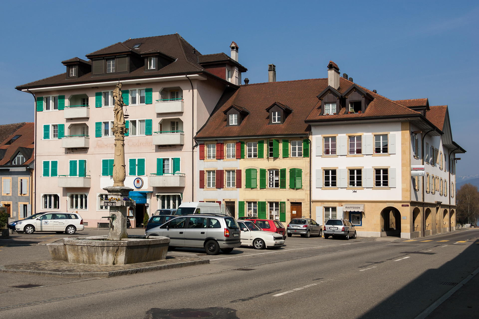 Cudrefin